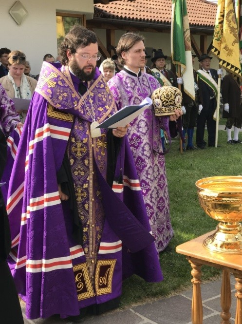 епископ Антоний (Севрюк) в Италии